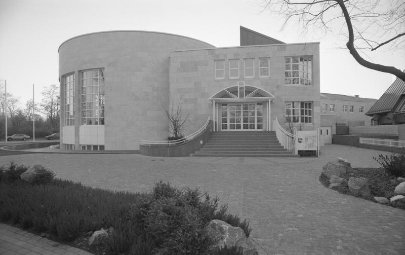 16.1.1991 Bonn Landesvertretung Niedersachsen beim Bund (Neubau, 1990 bezogen)